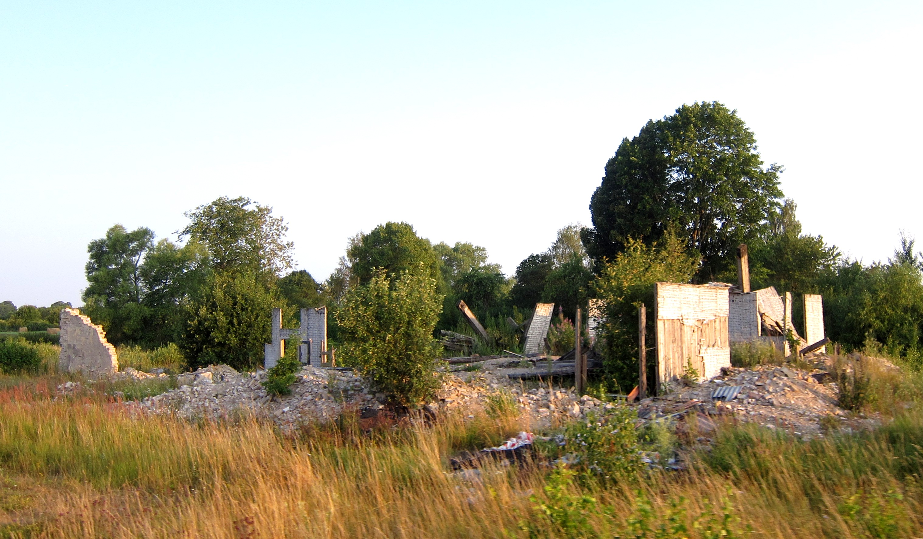 Durbes stacijas ēkas atliekas